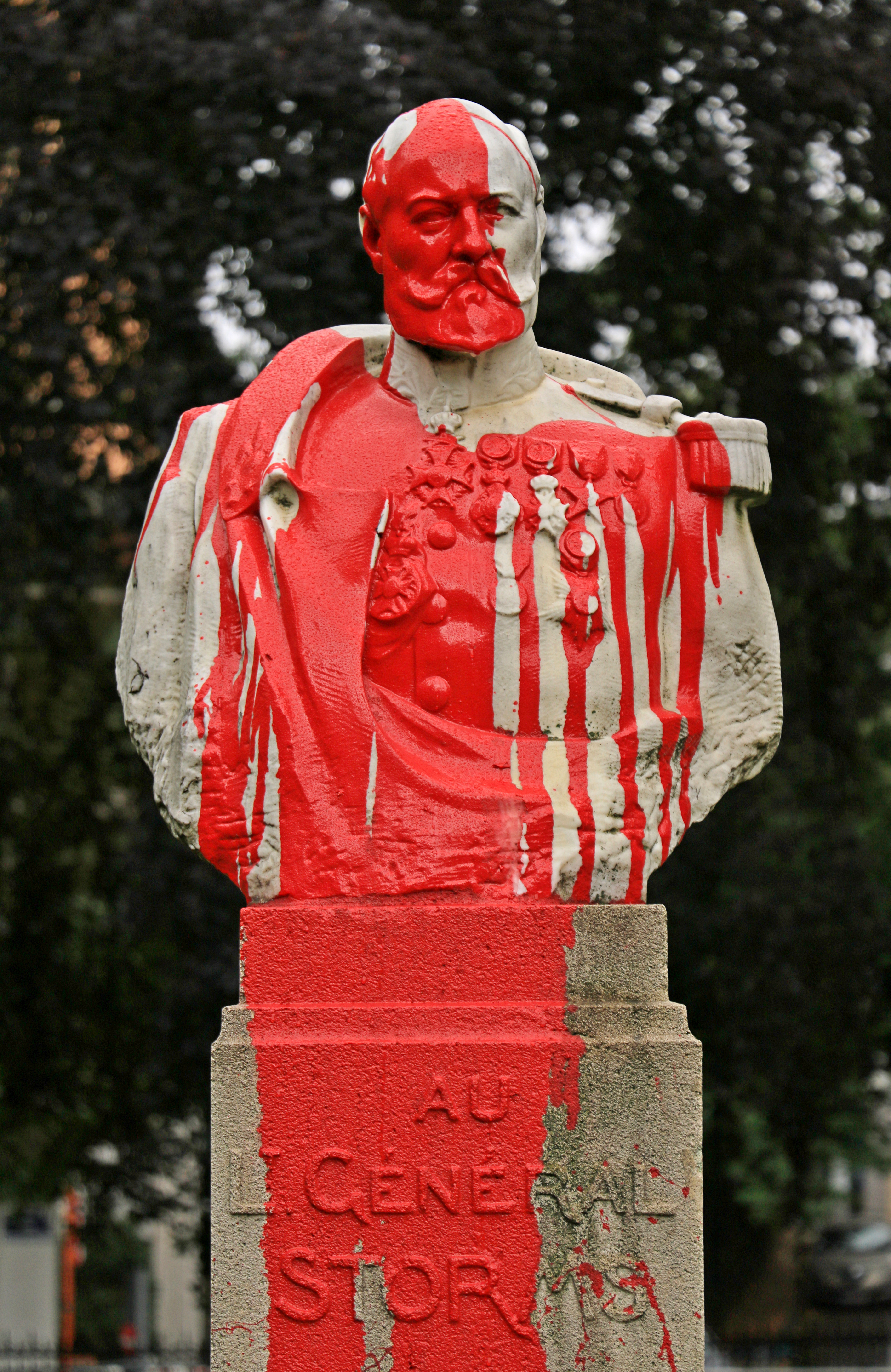 Belgique - Bruxelles - Monument au général Storms - square de Meeûs - dégradation en juin 2020 This photo of immovable heritage has been taken in the Brussels Capital Region